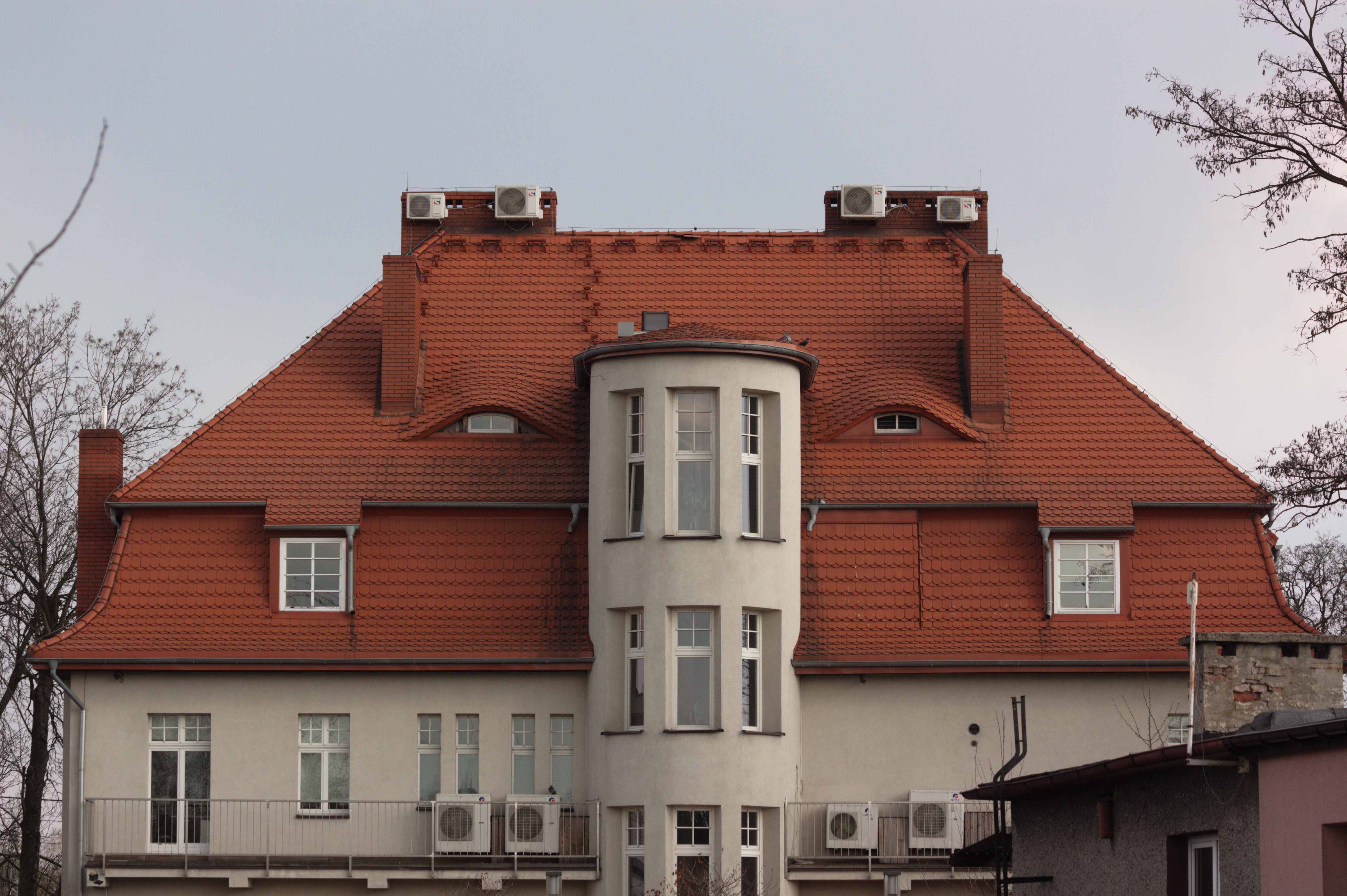 Ośrodek zdrowia w Katowicach Ligocie.